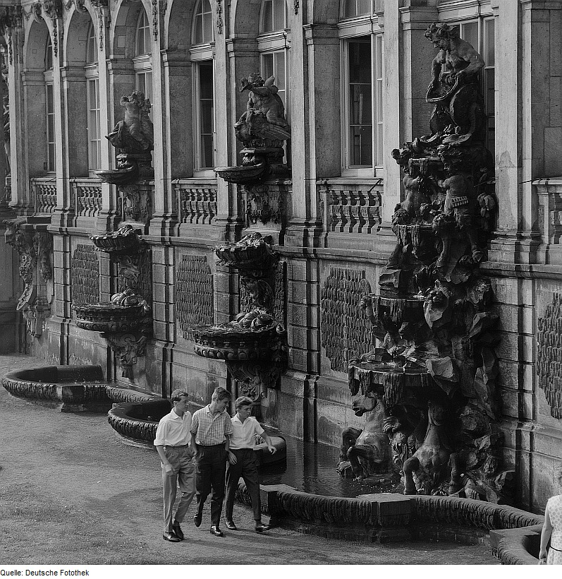 Original image description from the Deutsche FotothekDresden. Zwinger, Langgalerie O mit Brunnen